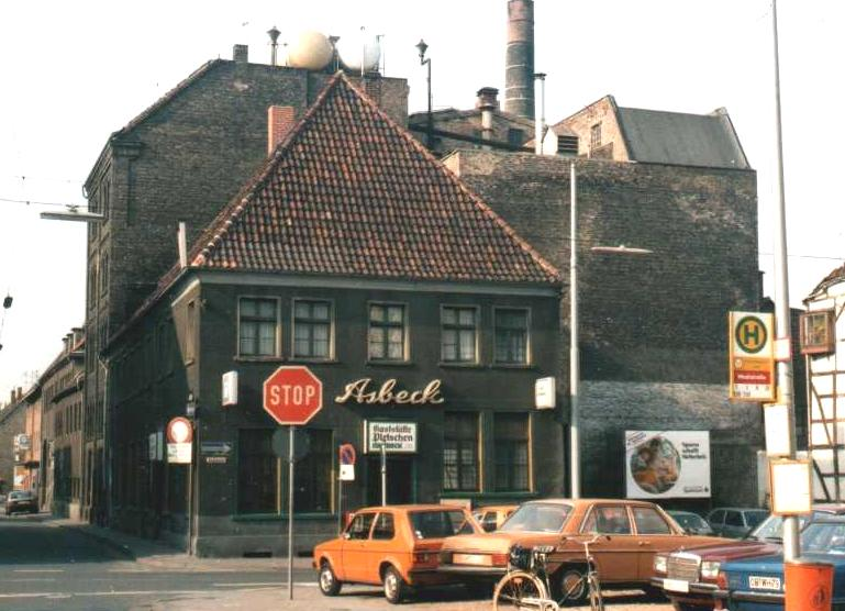 Das Foto zeigt "Haus Asbeck" in Hamm im Jahre 1986.